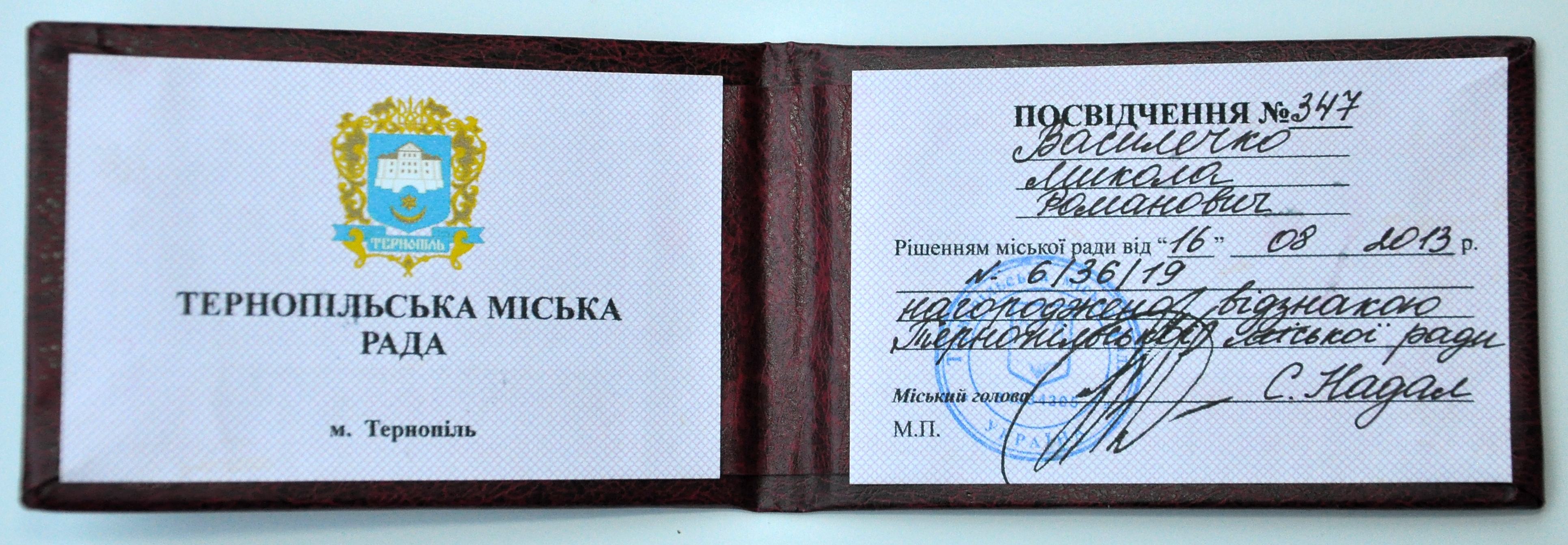 Посвідчення Миколи Василечка № 347 нагородженого Відзнакою Тернопільської міської ради рішенням сесії міської ради від 16 серпня 2013 року.